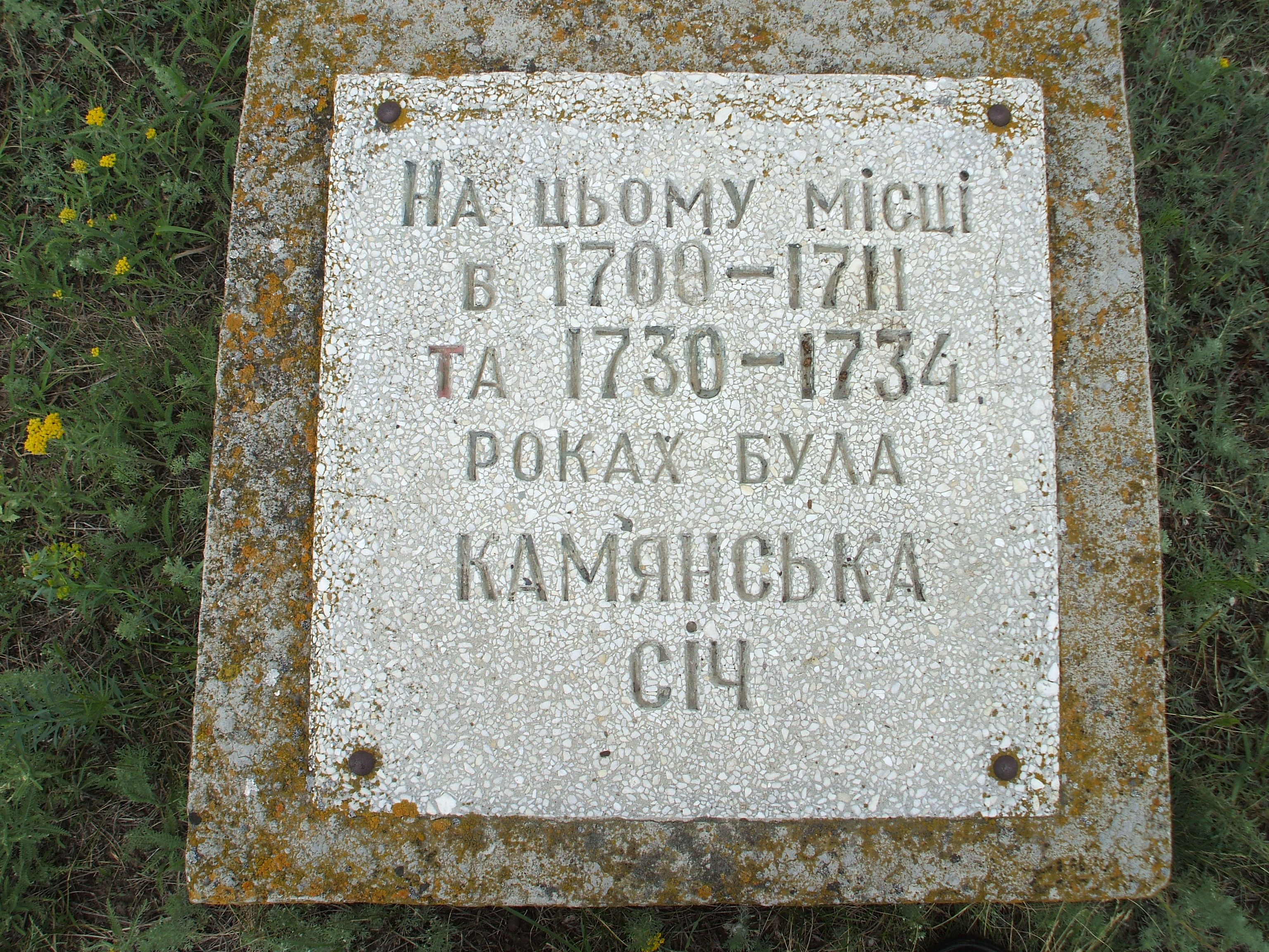 Знак на місці січі